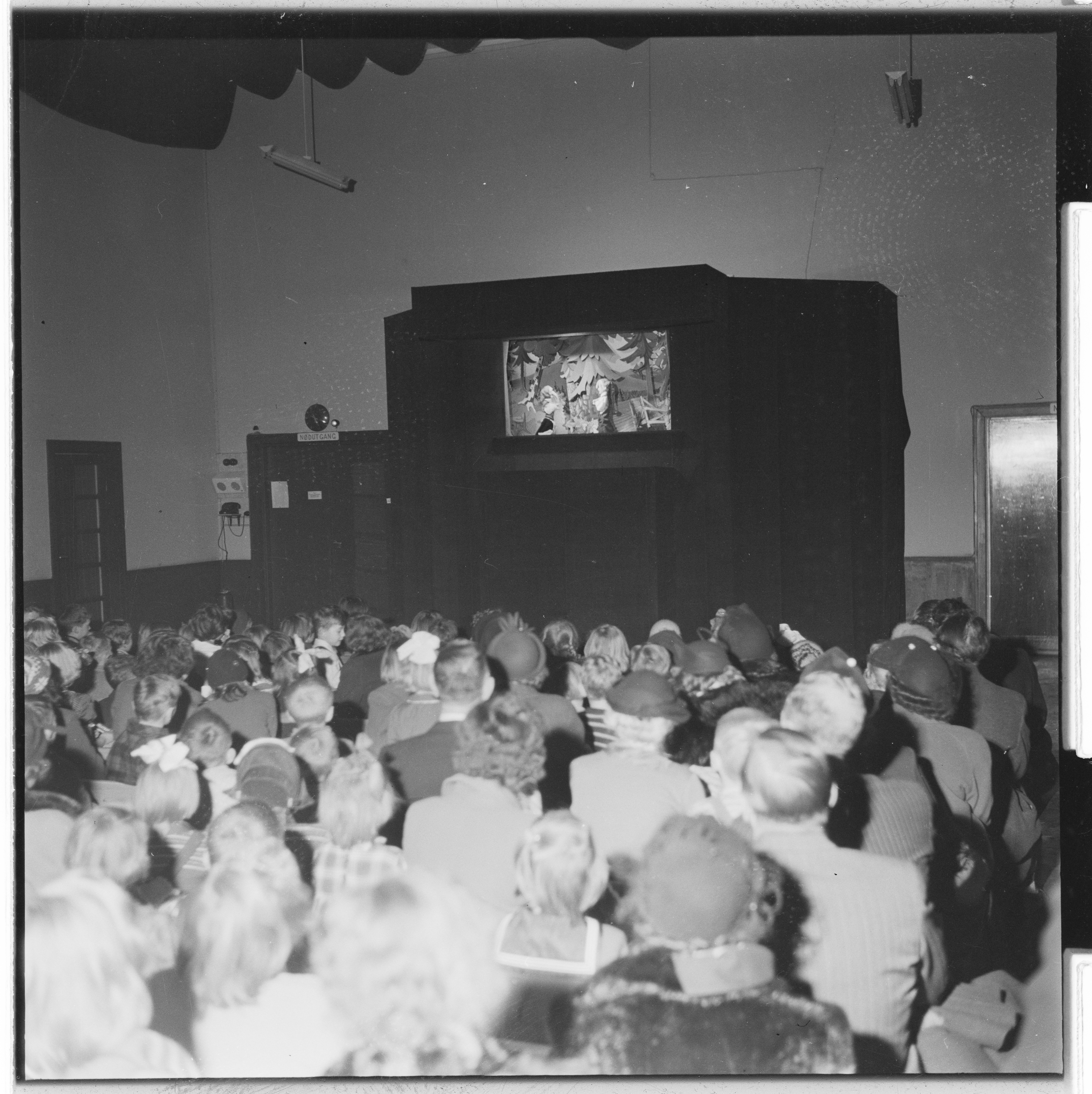 Bildet er hentet fra Arkivverket. Dukketeater "Gjete kongens harer". NÅ nr.3 Arkivinstitusjon : Arkivnavn : Billedbladet NÅ Sted : Norge, Ukjent, Ukjent, Ukjent Emneord: Dukketeater, Forestilling, Publikum Avbildet